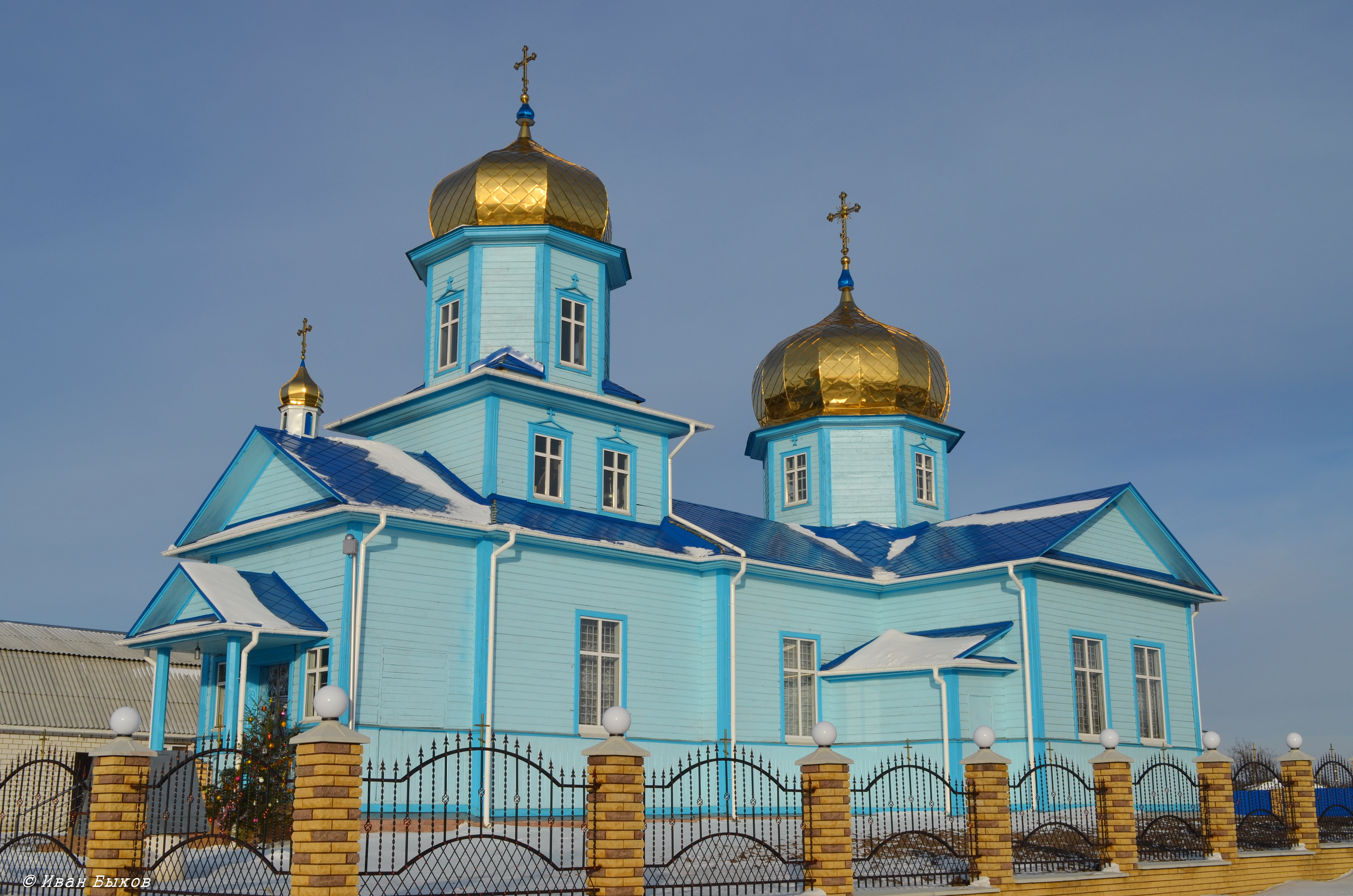 Михайлівська церква, село Кожухівка